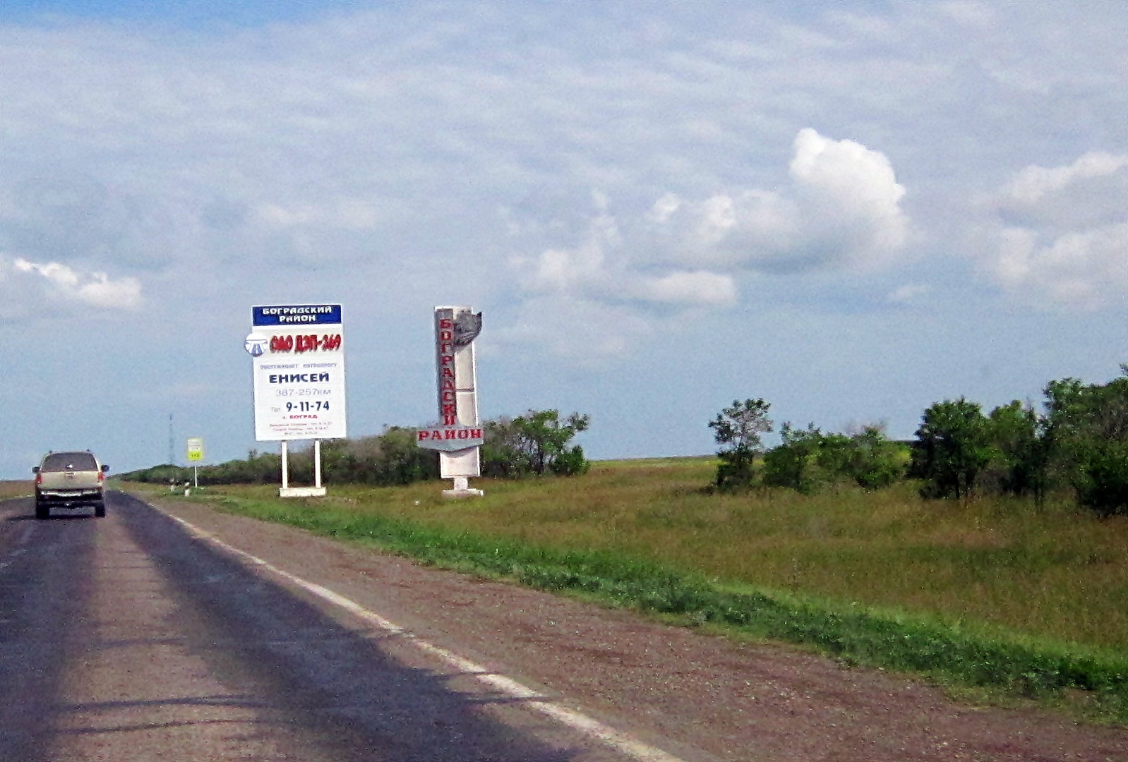 369-й км трассы "Енисей". Боградский район. Хакасия.